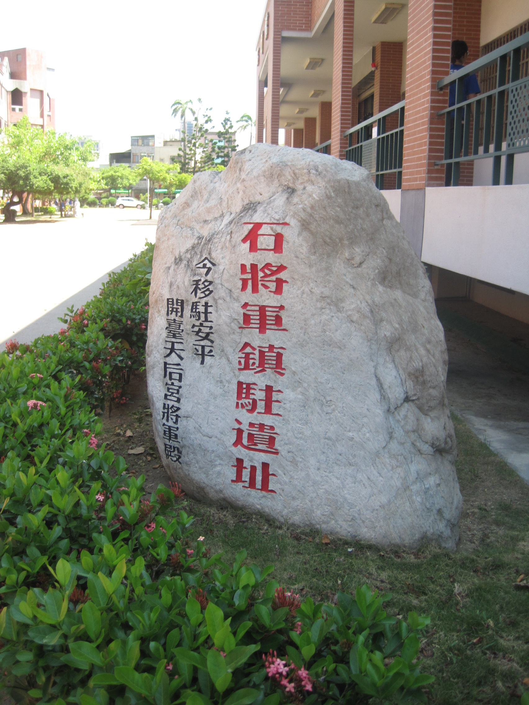 石將軍鎮駐遺址碑，位在石門國小校內。